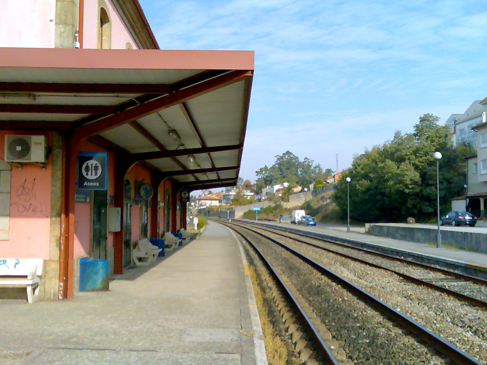 Estación de Padrón.